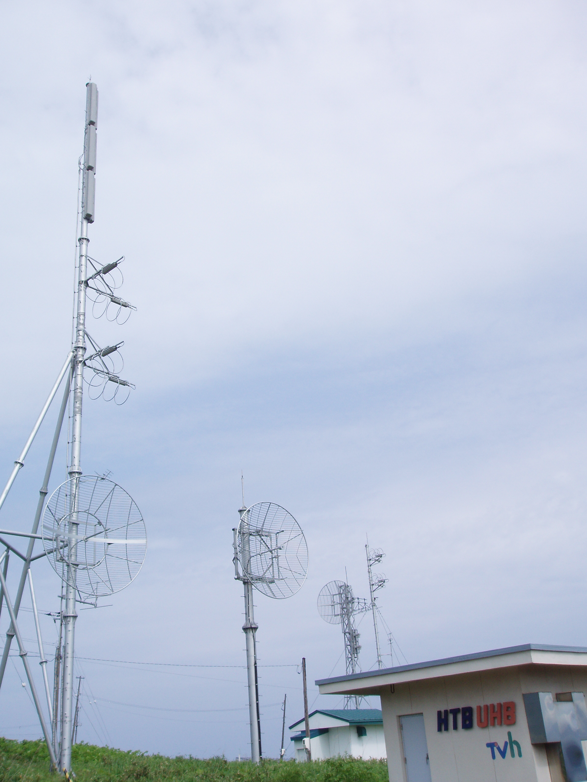 北桧山中継局 HTB・UHB・TVh送信設備